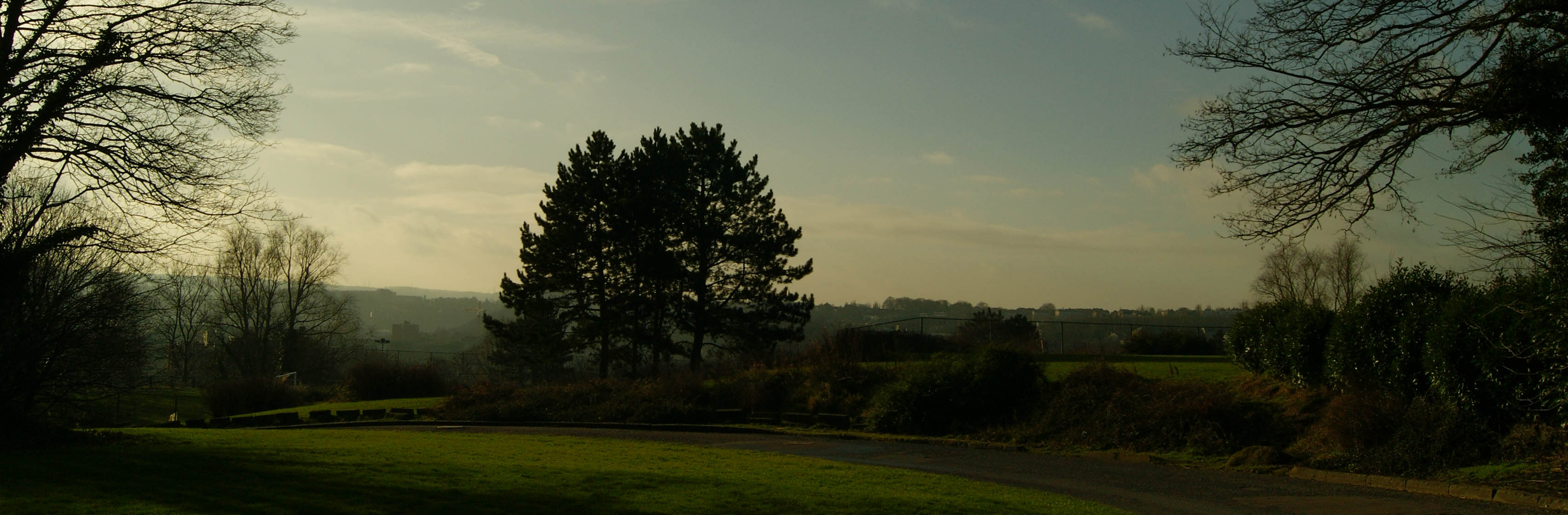 Vue au sommet de la rue Naimette. (Portion supérieure de la "rue de l'Arbre Rouge")